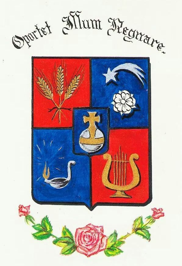 La familia Inesiana fue fundada por la Beata María Inés Teresa